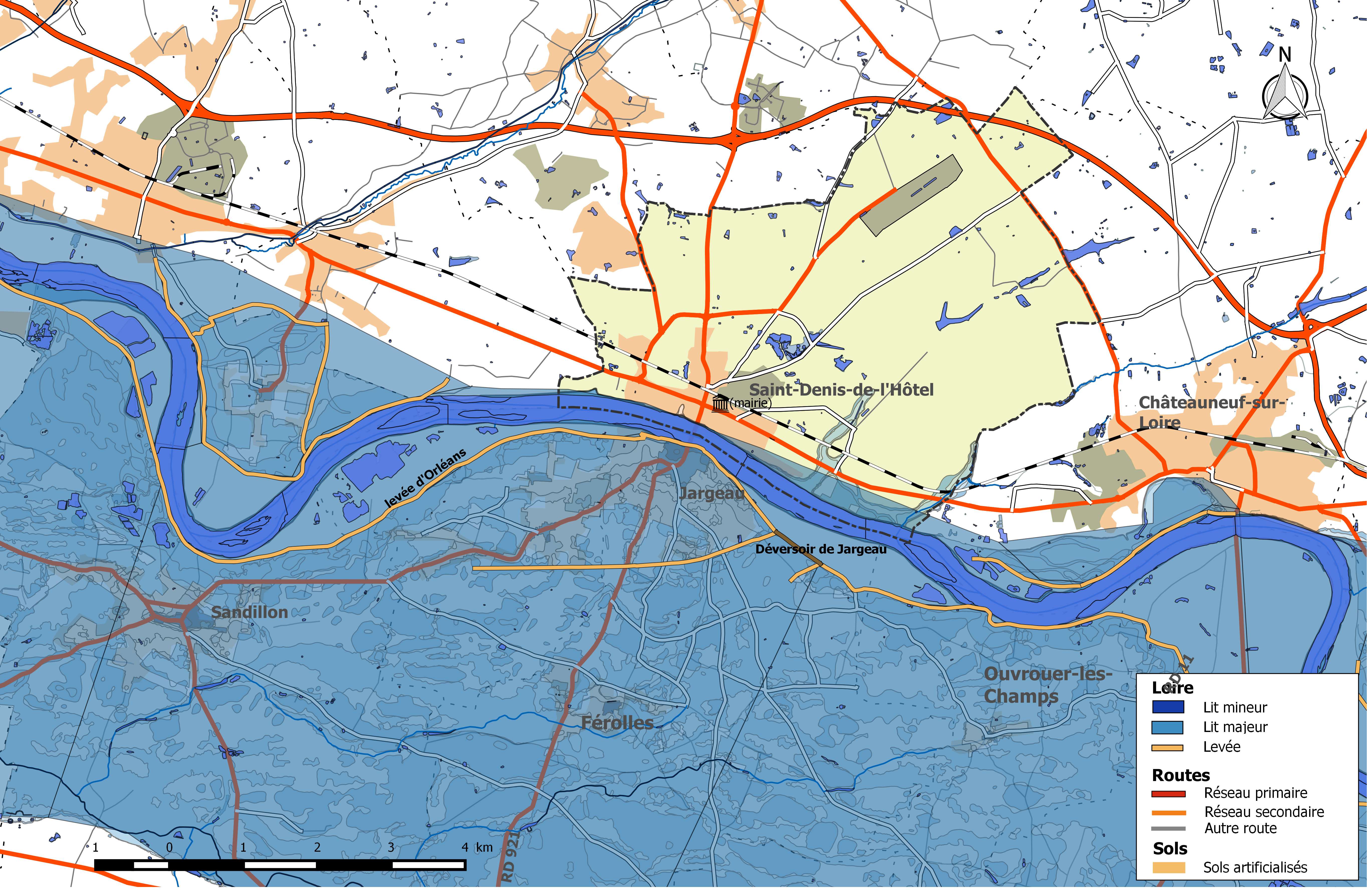 Zone inondable et réseaux hydrographique et routier de la commune de Saint-Denis-de-l'Hôtel.